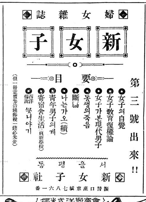 1920년 6월 4일자 신여자지 잡지 광고